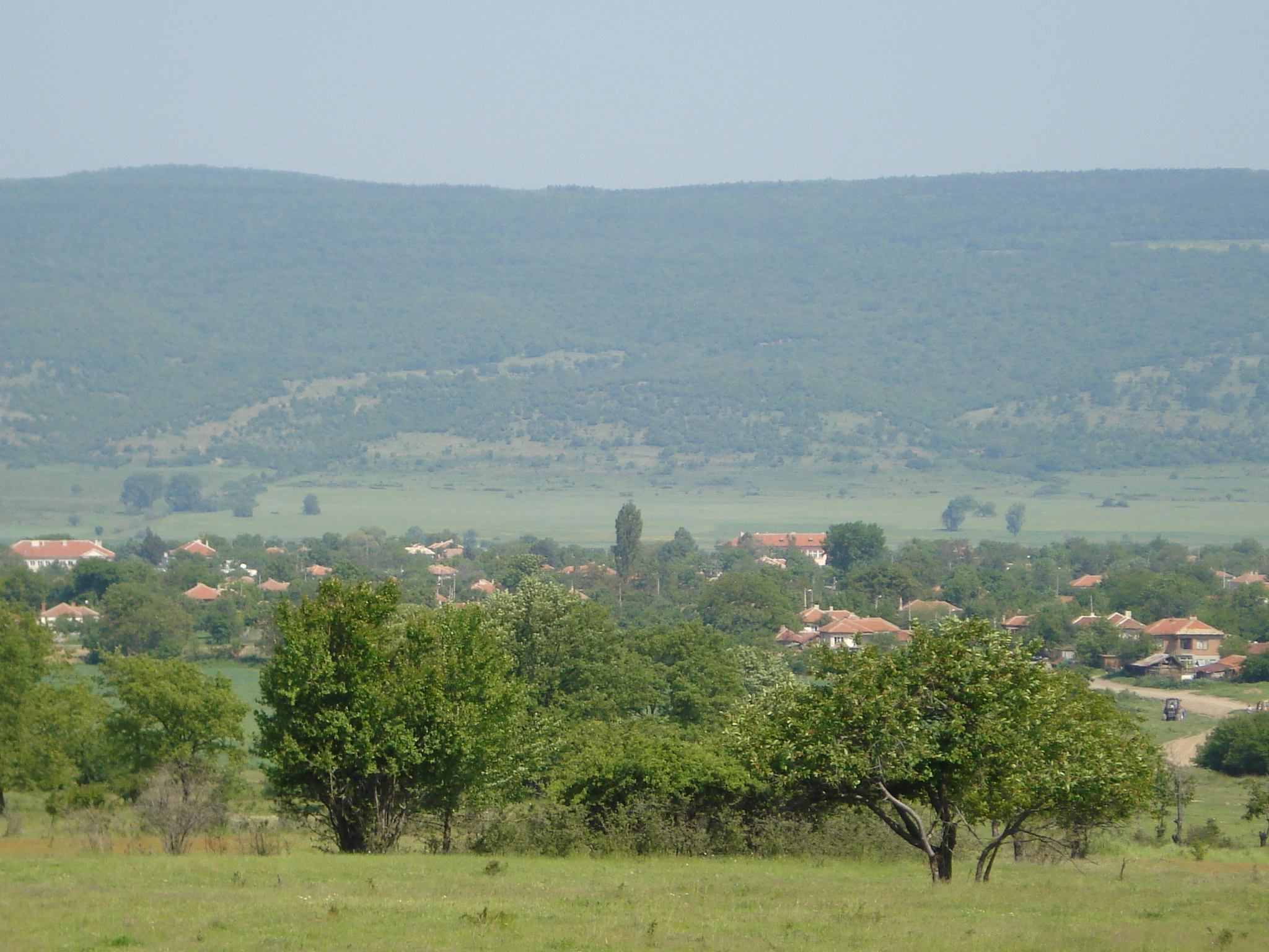 Изглед към Пъдарево